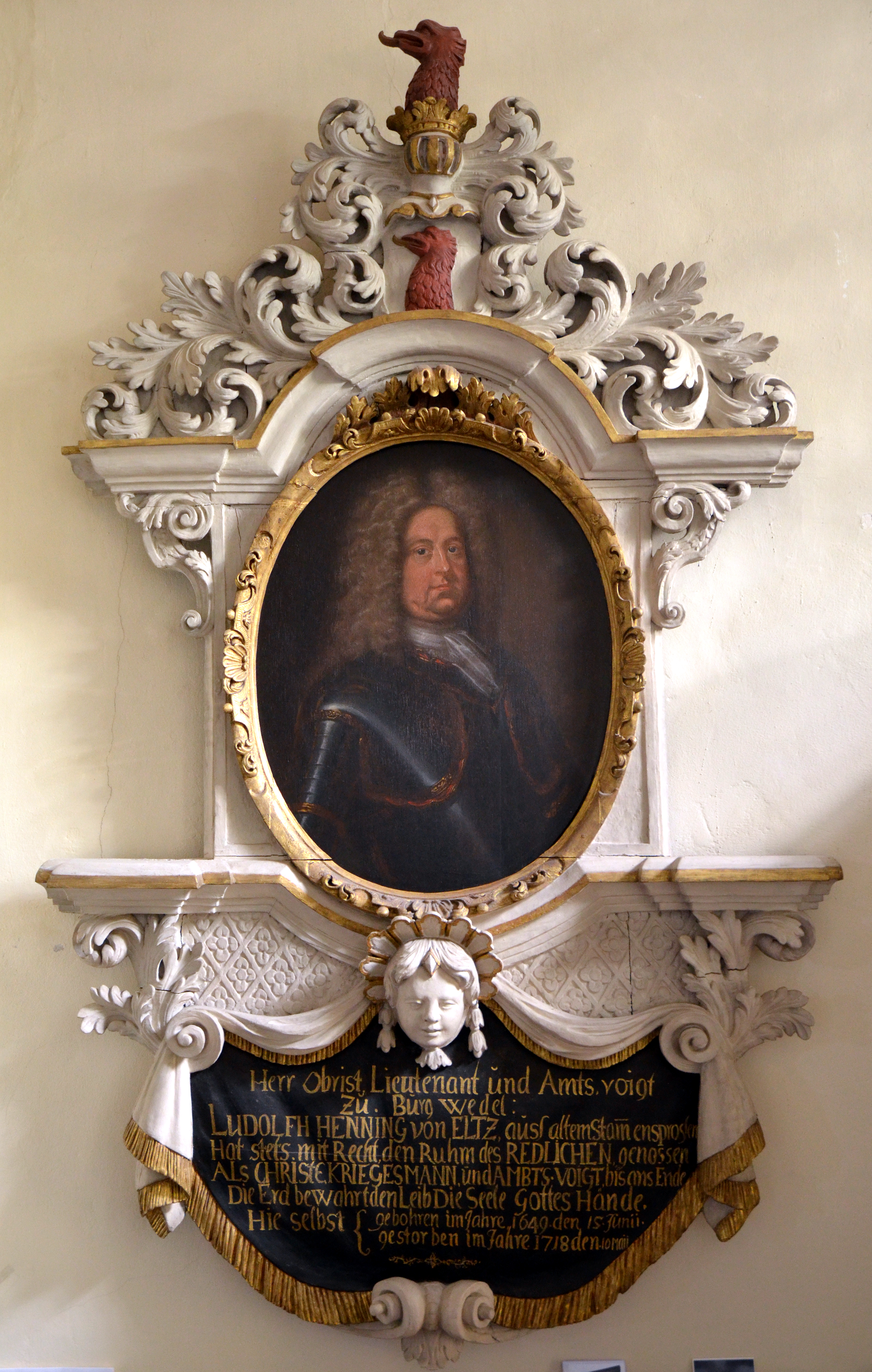 Barocker Epitaph aus geschnitzen und bemalten Holz mit einem Ölgemälde als Brustbild des Obristen, Leutnants und Amtsvogts von Burgwedel „Ludolf Henning von Eltz“ in der Kirche St. Petrus in Burgwedel ...